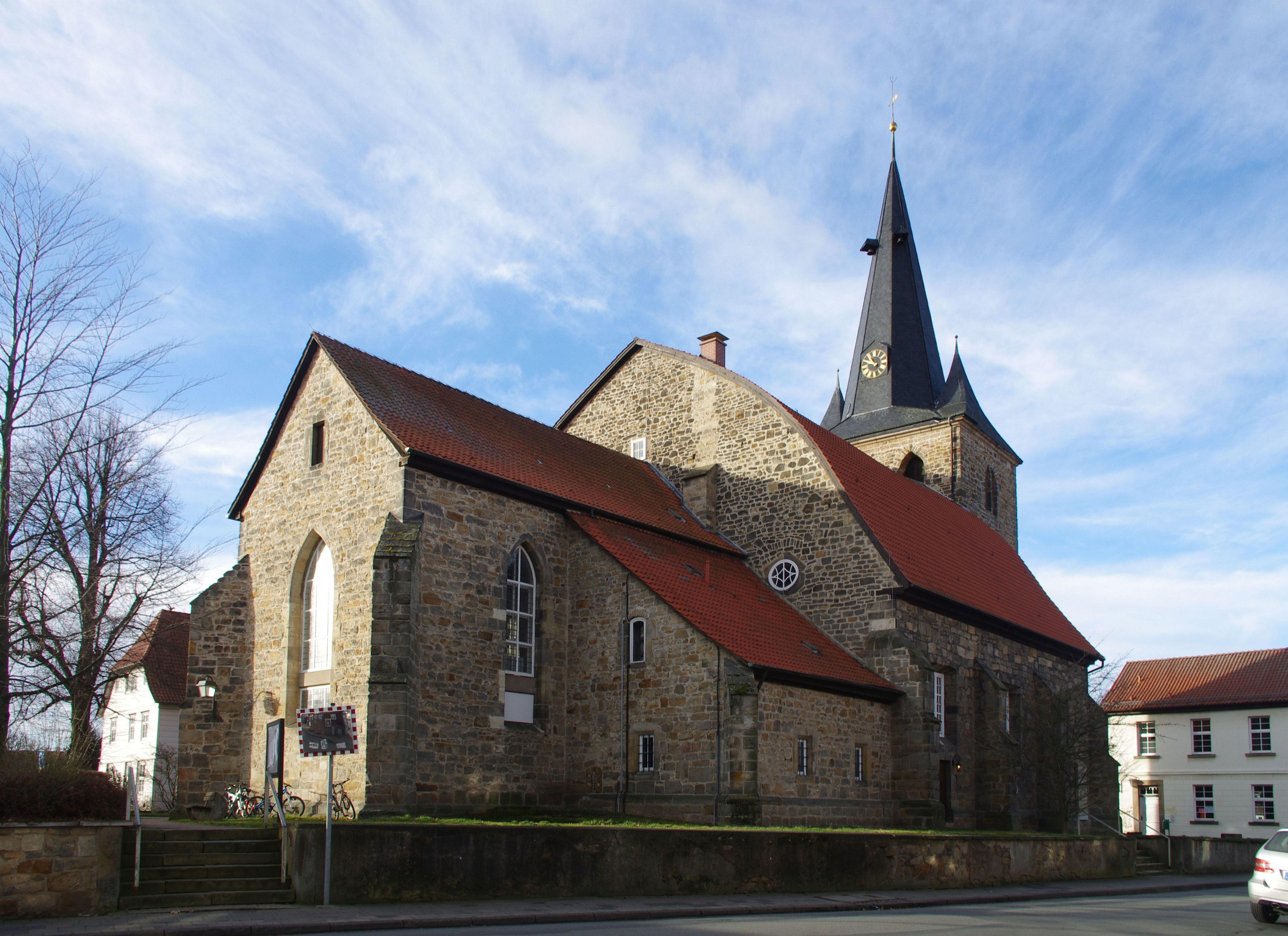 Pattensen, ev.-luth. St.-Lukas-Kirche